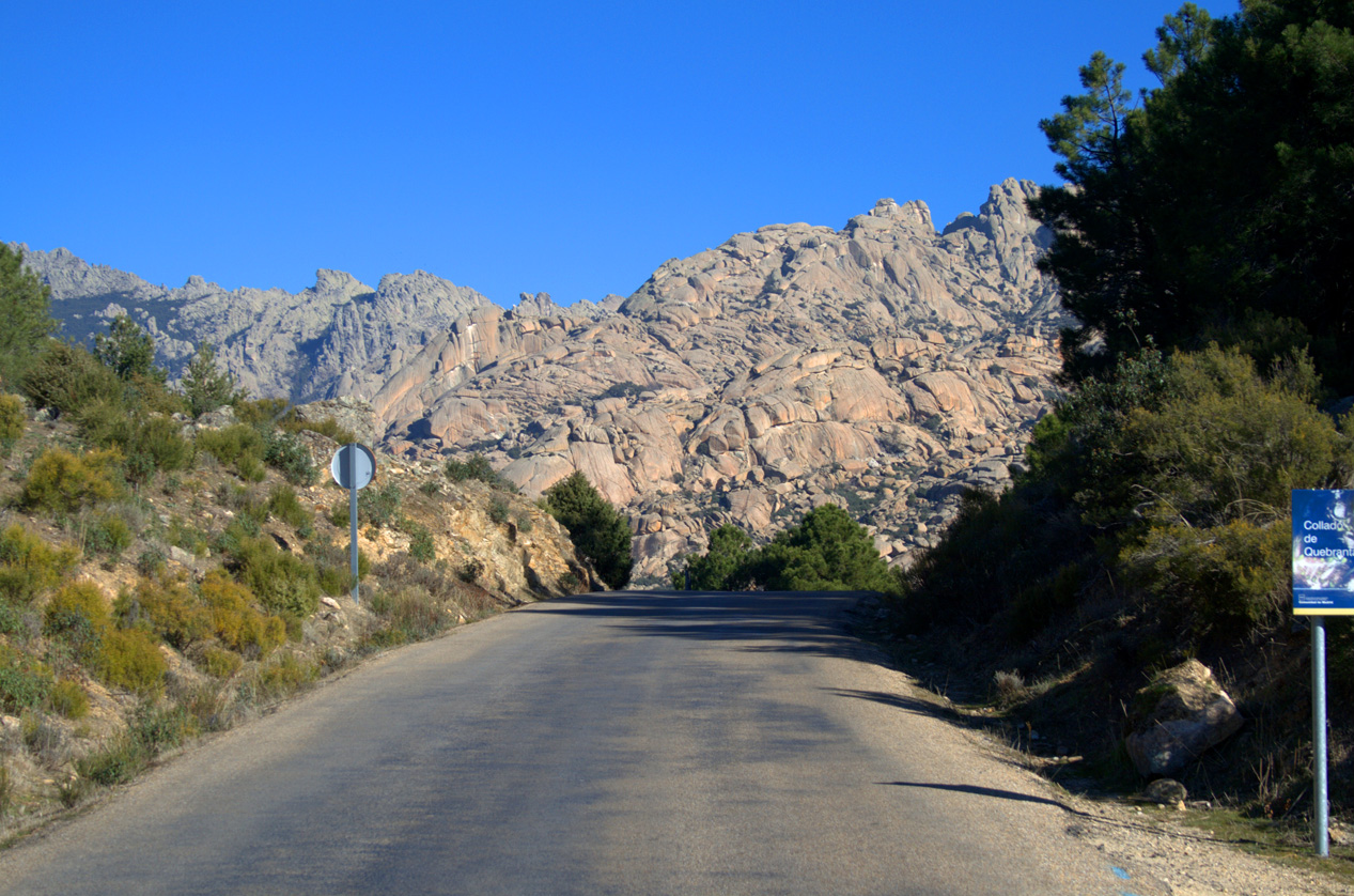 Collado de Quebrantaherraduras, Comunidad de Madrid, España.